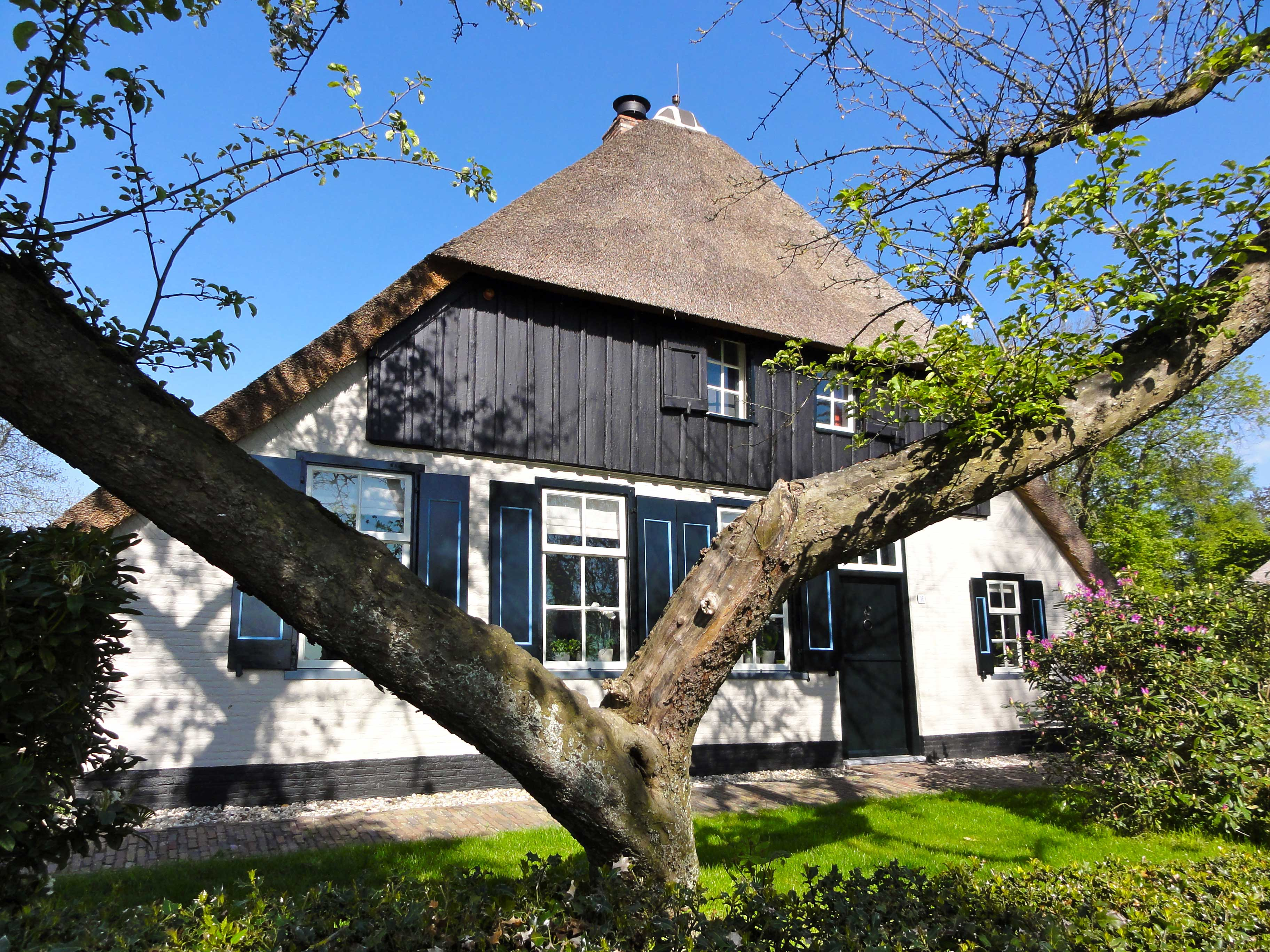 Binnenpad 96 Giethoorn (rijksmonument)